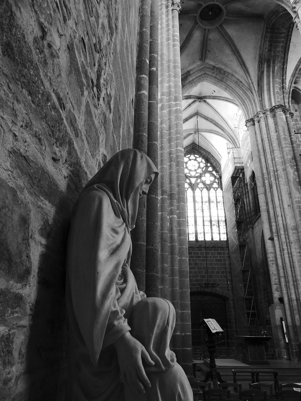 Saint-Anne & Marie - Transept nord - Cathédrale St-Samson de Dol-de-Bretagne